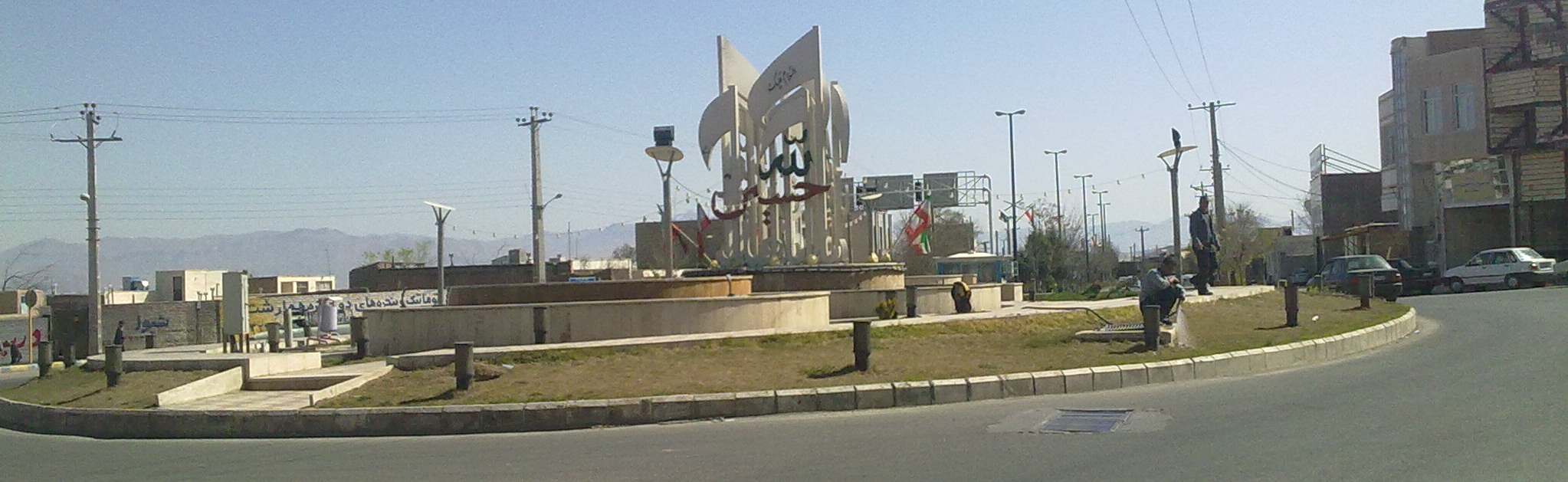 Main Square, Nimvar میدان اصلی شهر نیمور